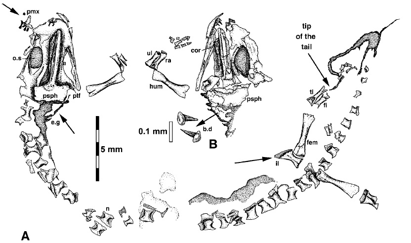 Tungussogyrinus bergi. A. PIN 4262/4a, the complete skeleton from the snout to the tip of the tail. Note the tricuspid teeth, the external gills and the anterodorsally directed process of the ilium; B. PIN 4262/4b, note the presence of branchial denticles; Sl about 8 mm. Abbreviations: b.d – branchial denticles; cor – coronoid; e.g – external gills; fem – femur; fi – fibula; hum – humerus; il – ilium; n – neural arch; o.s – orbital sac; pmx – premaxilla; psph – parasphenoid; ptf – postfrontal; ra – radius; ti – tibia; ul – ulna.